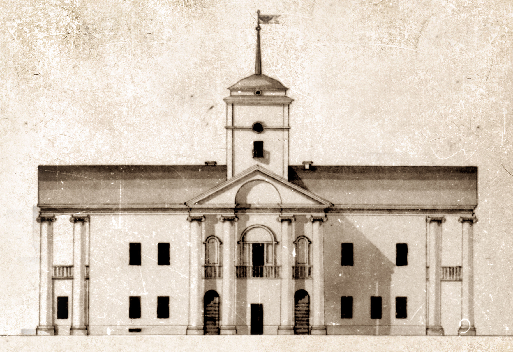 Беларуская (тарашкевіца): Менск (Miensk), пляц Высокі Рынак (plac Vysoki Rynak). Ратуша, праект